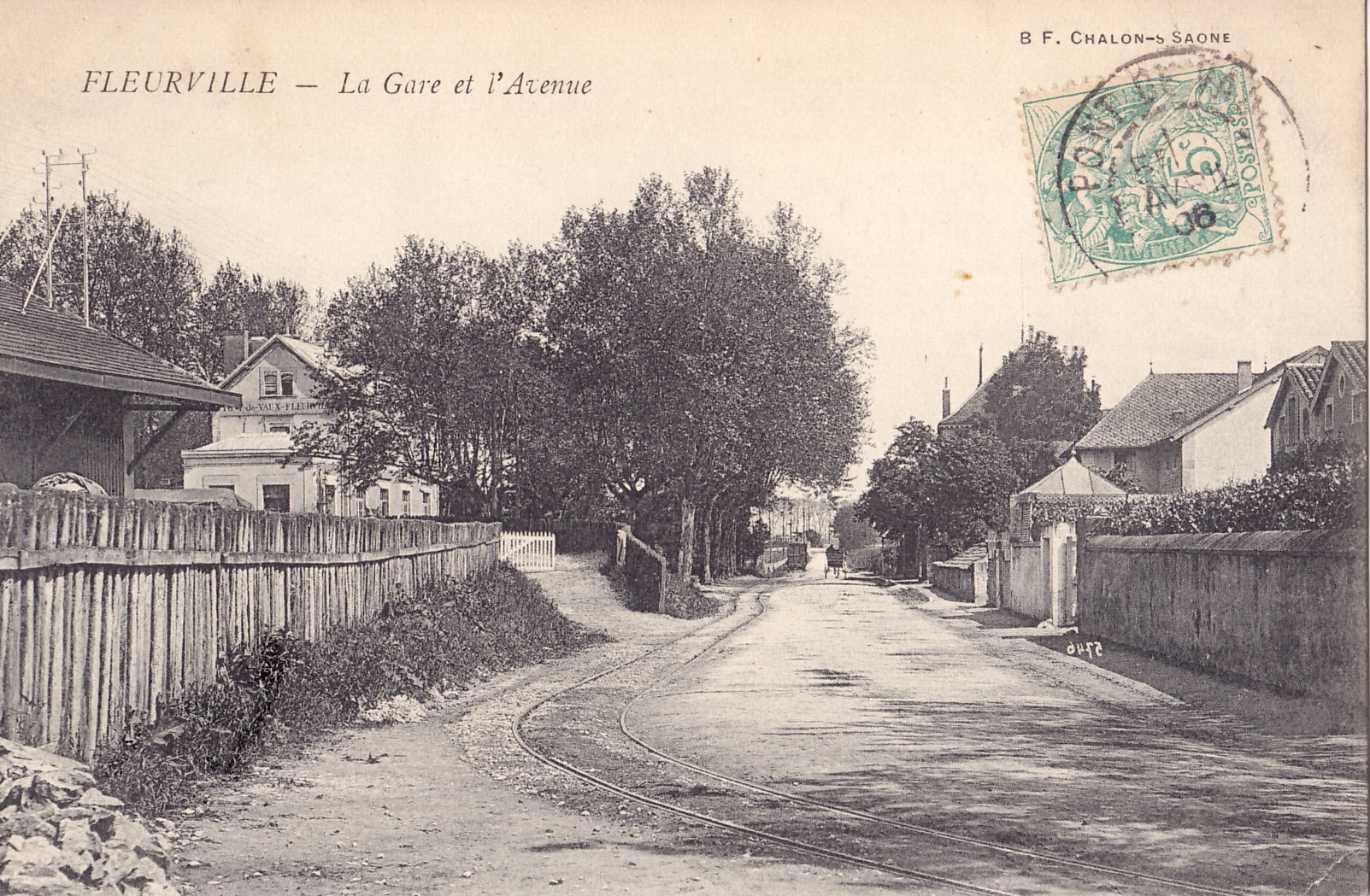 Carte postale ancienne éditée par B. F à Chalon-sur-Saône : FLEURVILLE - La Gare et l'Avenue